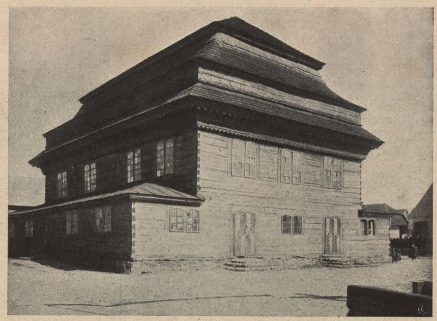 Materiały z wystawy Architektury Polskiej, urządzonej w 1915 r. staraniem Koła Architektów i Towarzystwa Opieki nad Zabytkami Przeszłości w Warszawie.